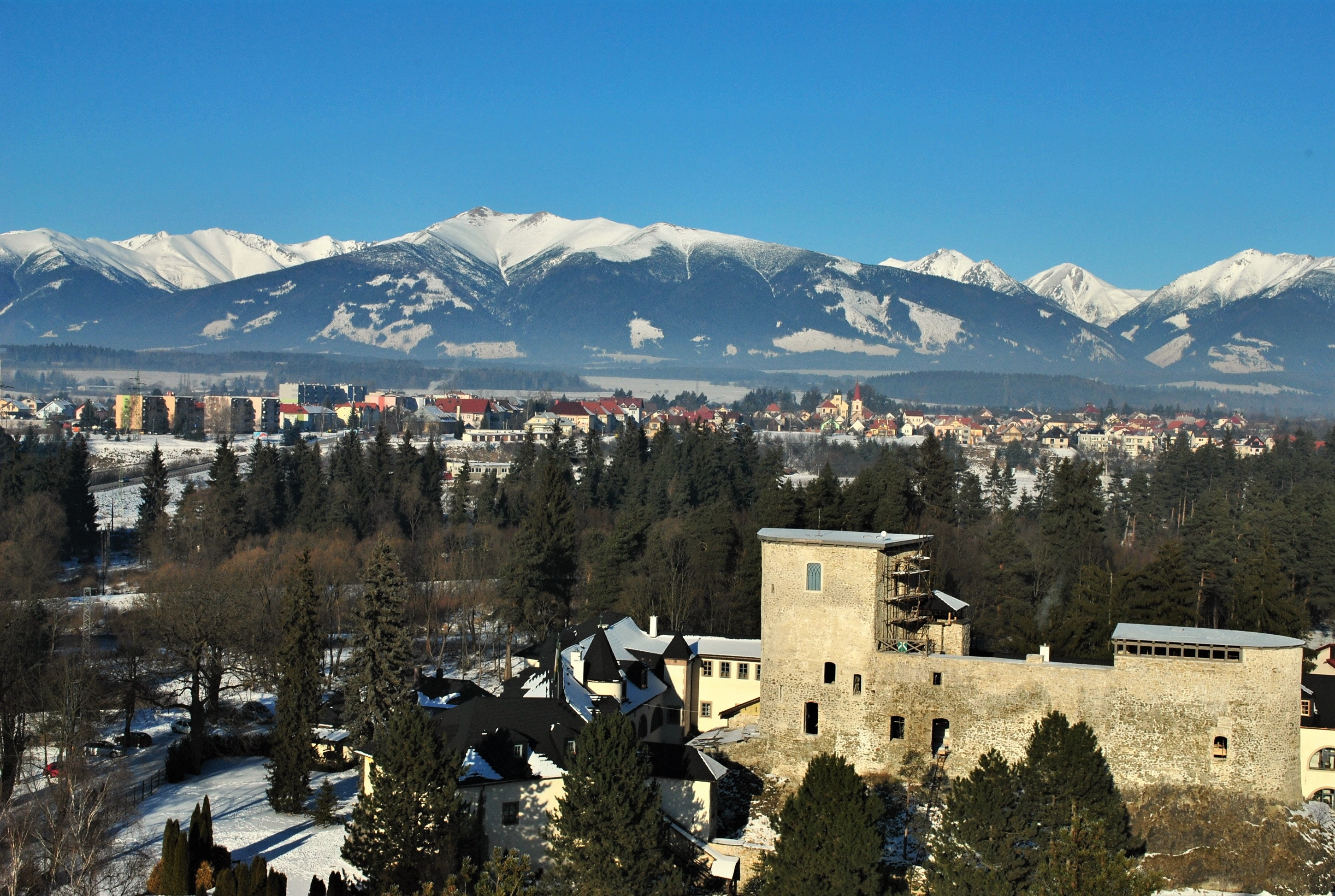 Dedina Liptovský Peter (v pozadí) s hradom v Liptovskom Hrádku (v popredí)